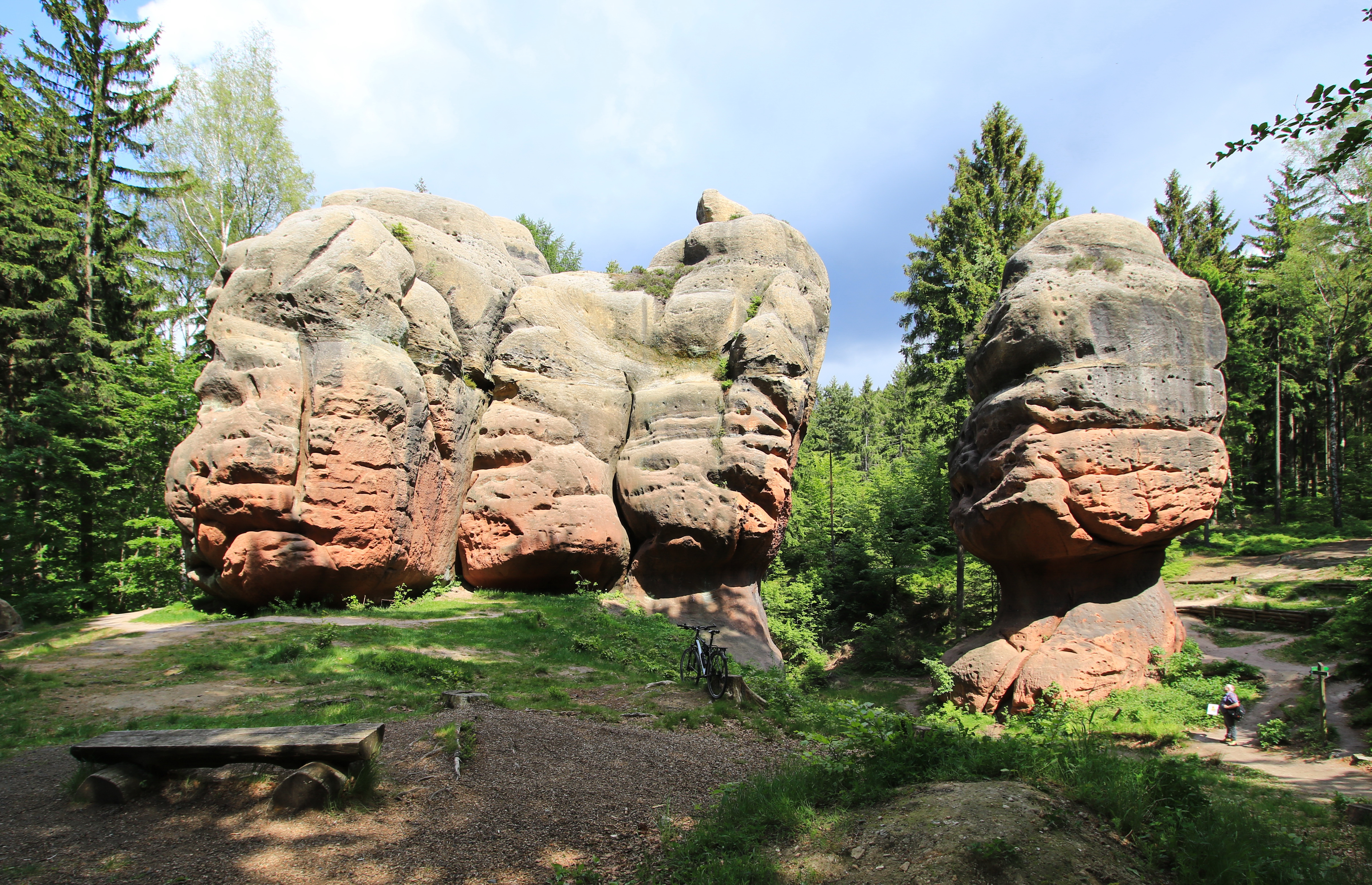 Naturdenkmal Kelchsteine bei Oybin im Naturpark Zittauer Gebirge in Sachsen.